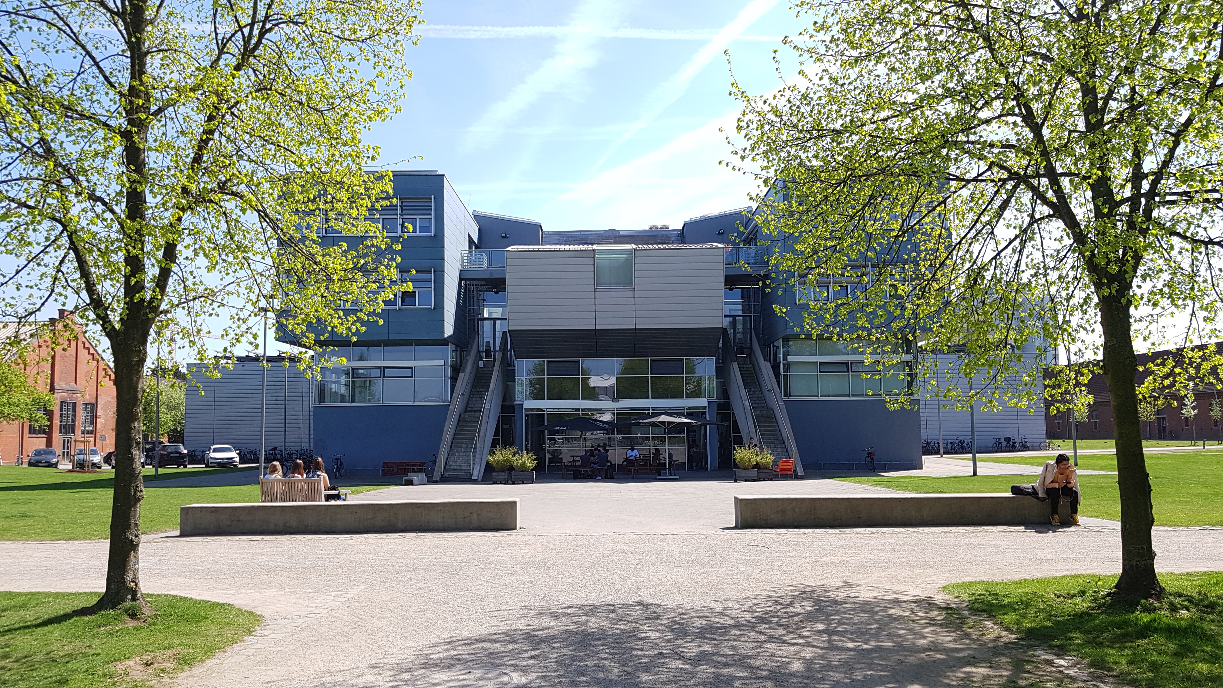 Ansicht des Hauptgebäudes der Kunstakademie Münster auf dem Leonardo-Campus.